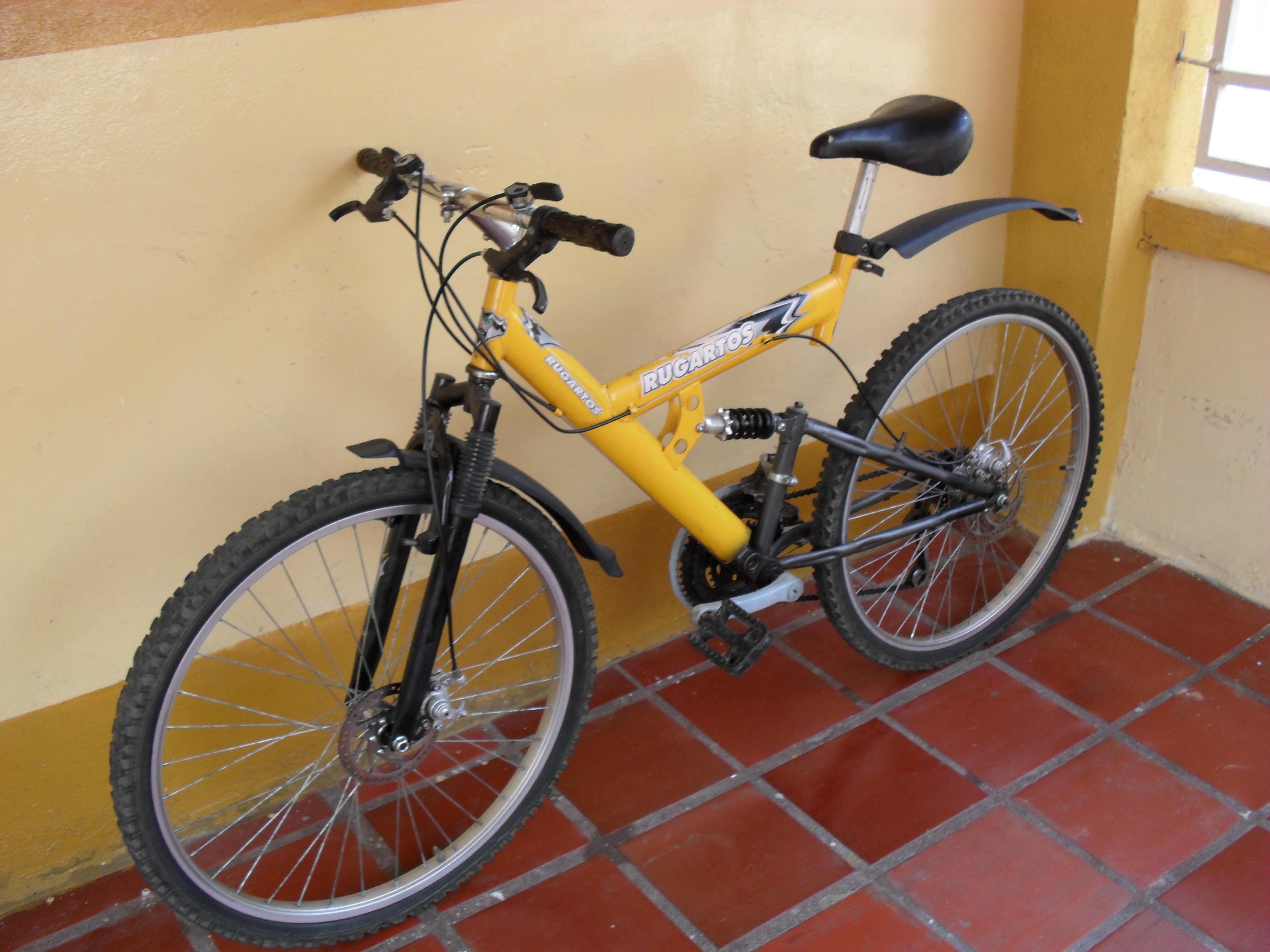 Foto de una bicicleta montañera con suspensión delantera y trasera y frenos de disco